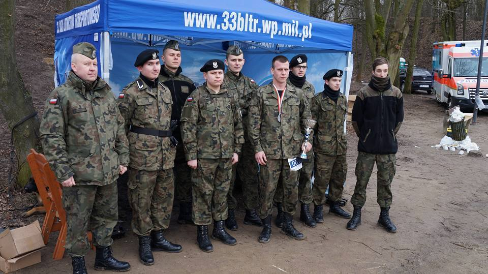 Strzelcy z Gniezna z żołnierzami 33 Bazy Lotnictwa Transportowego z Powidza, podczas Biegu Tropem Wilczym 2017